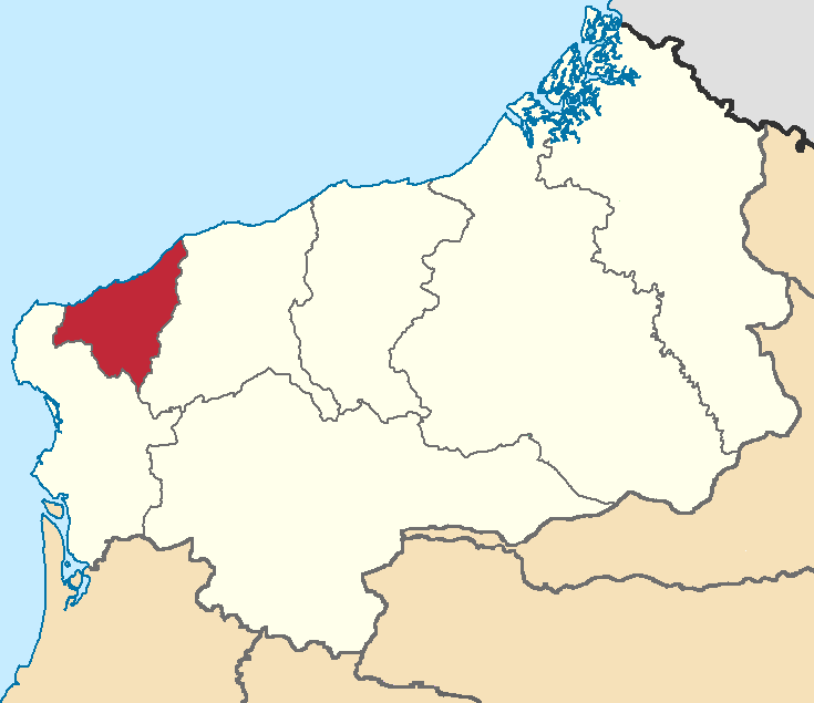 Mapa localizacor del cantón Atacames, Esmeraldas, Ecuador